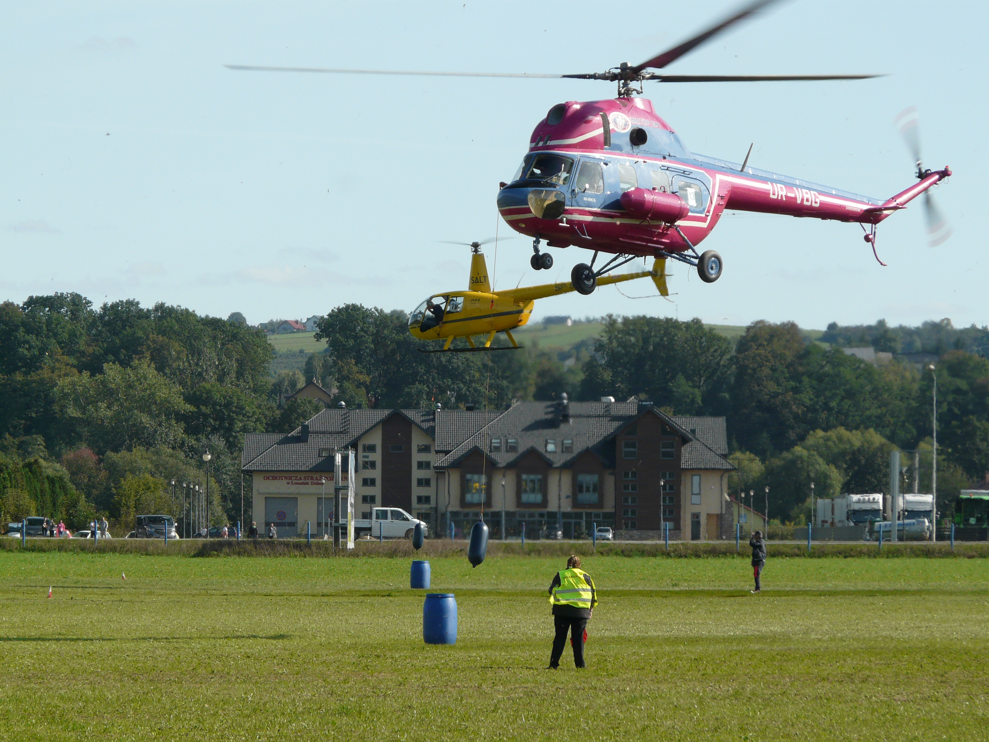 Helikopter World Cup 2019, zawody śmigłowcowe w Łososinie Dolnej: ukraińska załoga Muslienko Vladyslav, Sokolov Igor (Mi-2), załoga rosyjska Baraev Andreyi, Sazonov Vadim (R-44)